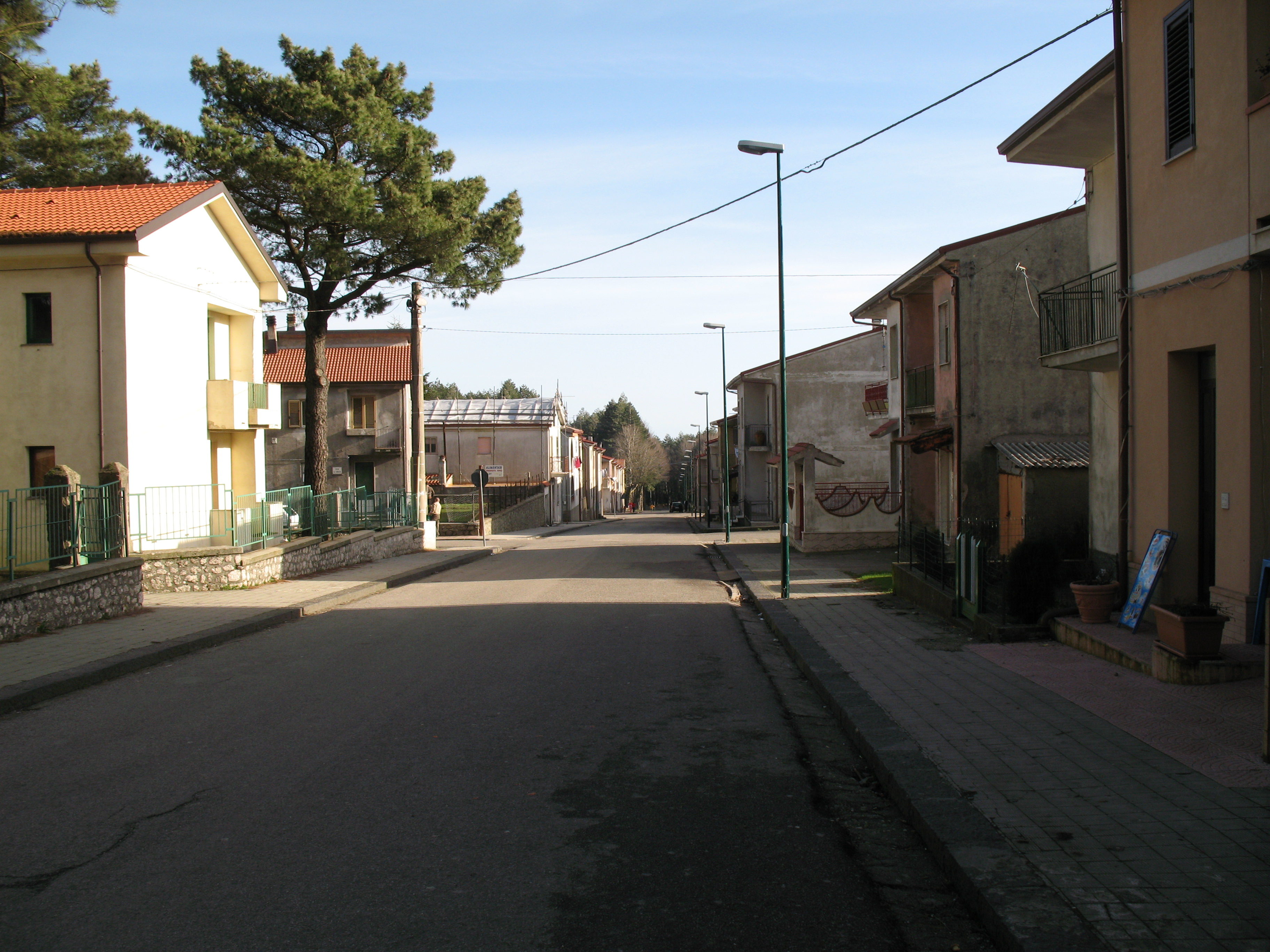 Canolo (RC), frazione Canolo Nuovo, Viale Europa